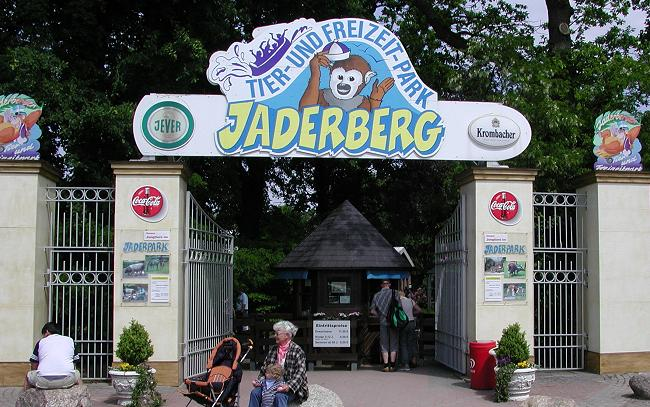 Eingang zum Jaderpark, Landkreis Wesermarsch, Niedersachsen, Deutschland